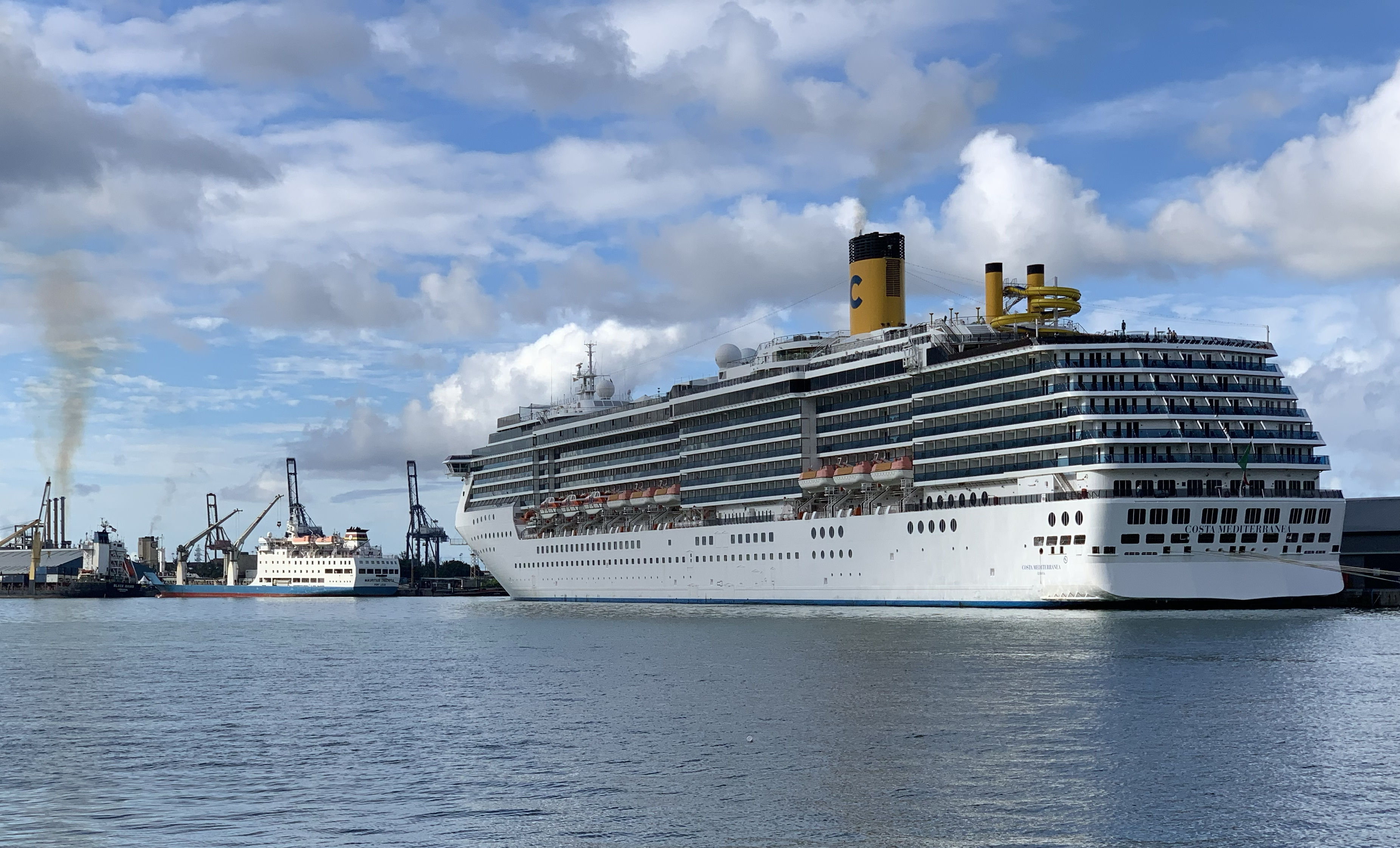 Le Costa Mediterranea dans la rade de Port Louis (Maurice) le 29 février 2020. Il devrait rester quelques jours après avoir été refoulé des Seychelles dans le contexte du coronavirus.